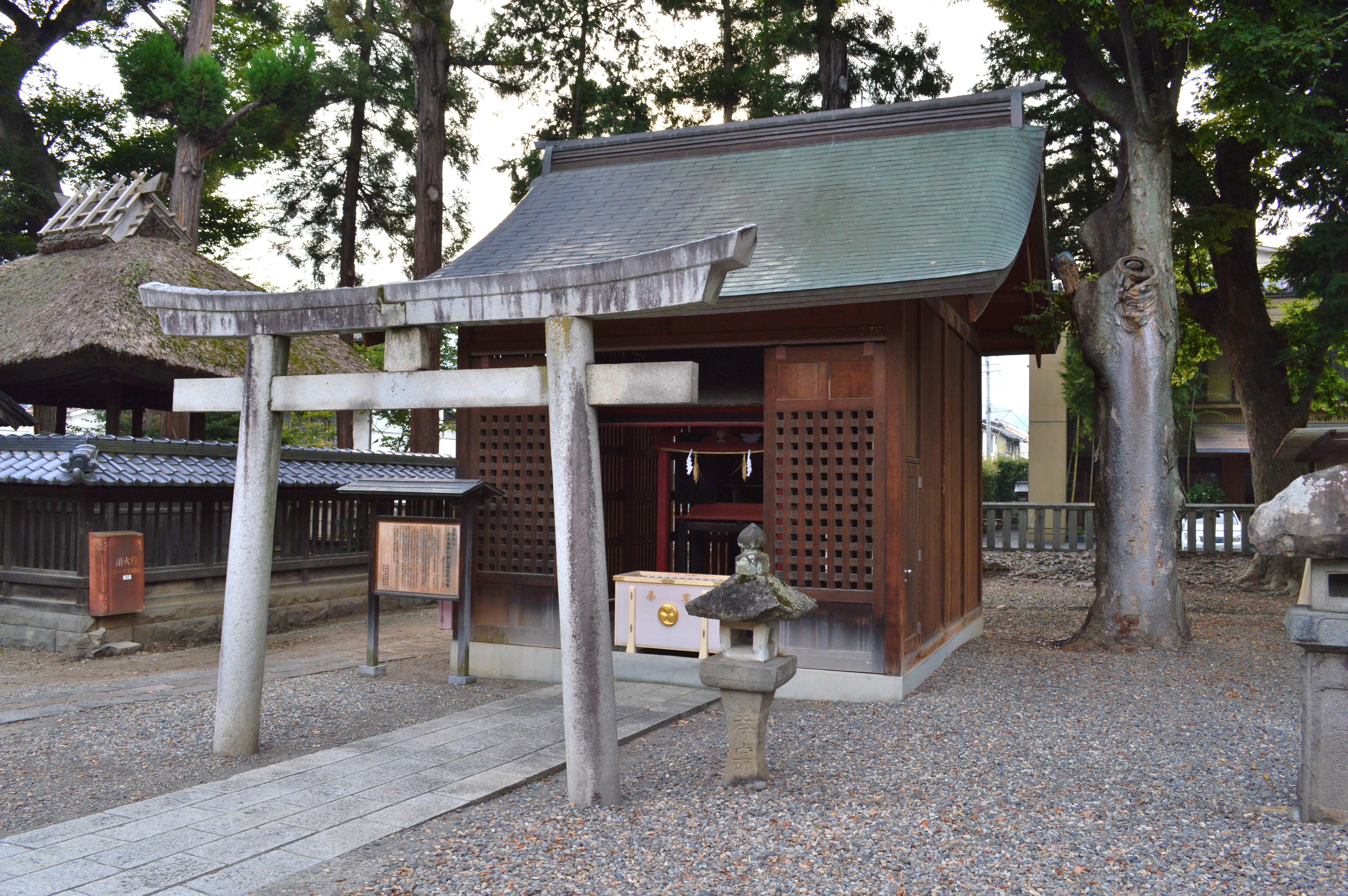 高良社 (武水別神社摂社)